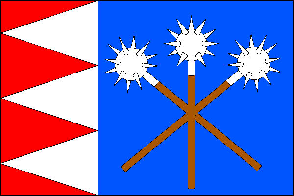 vlajka, Říkovice, okres Přerov